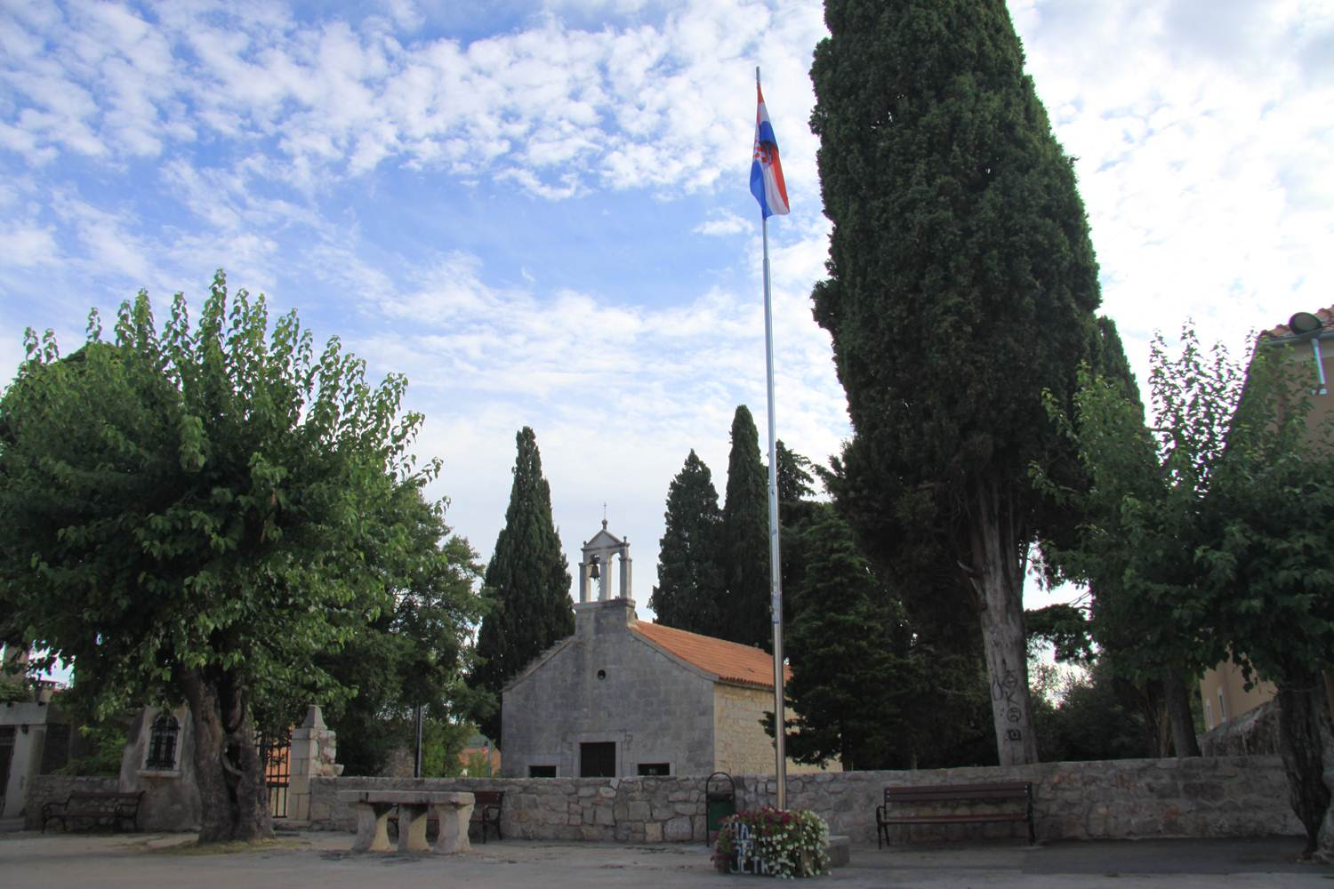 Die Kirche der gnädigen Madonna befindet sich im Zentrum des alten Dorfes von Sukosan, gegenüber dem Stadttor „Gornja vrata“, auf dem gleichnamigen Platz.